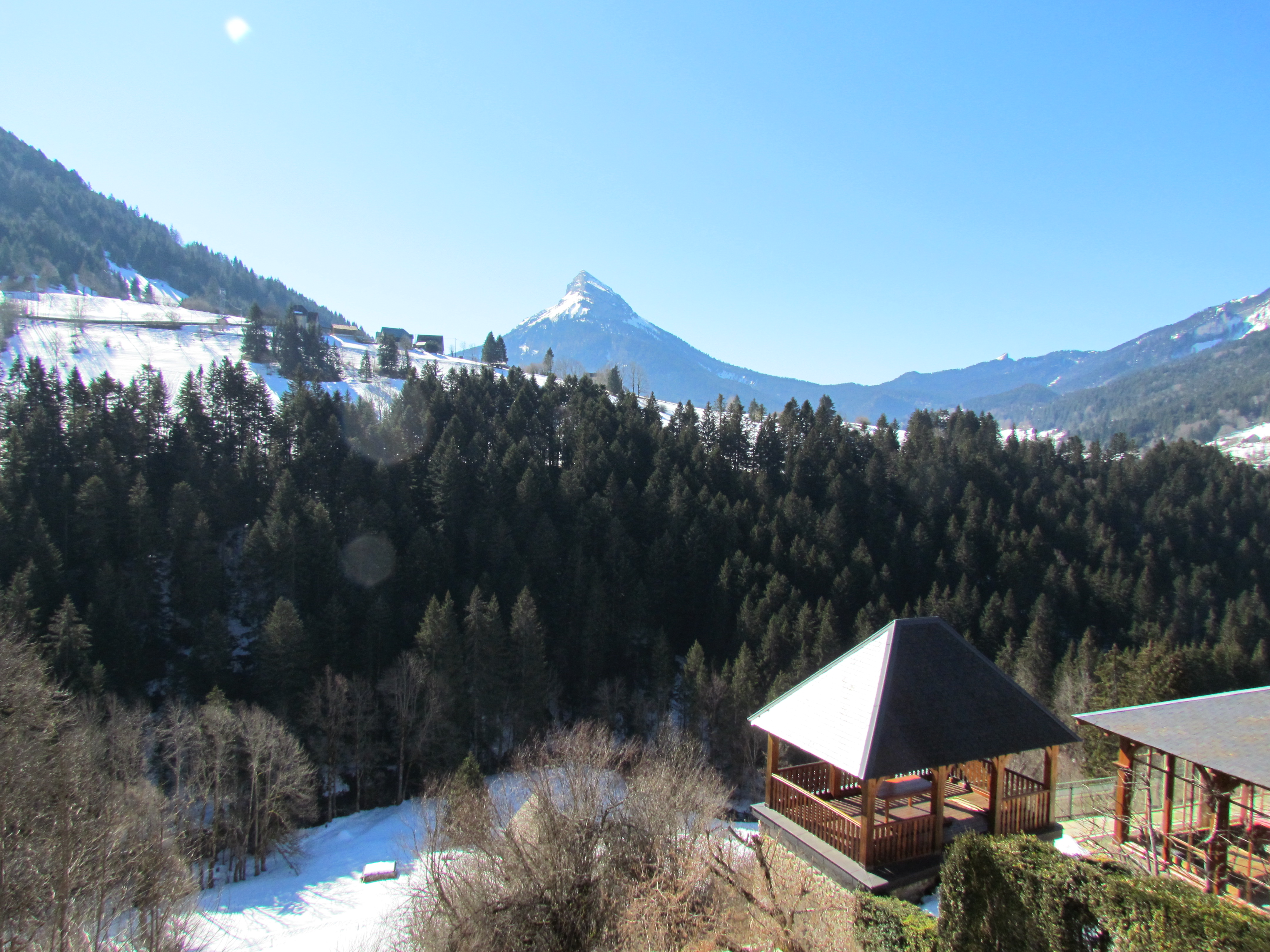 Vue sur La Chamechaude depuis la table d'orientation